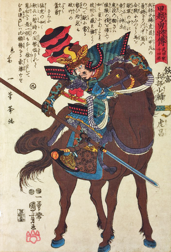 「甲越勇將傳武田家廾四將 ：飫富兵部少輔虎昌」1848年作